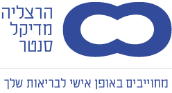 מחוייבים באופן אישי לבריאות שלך!